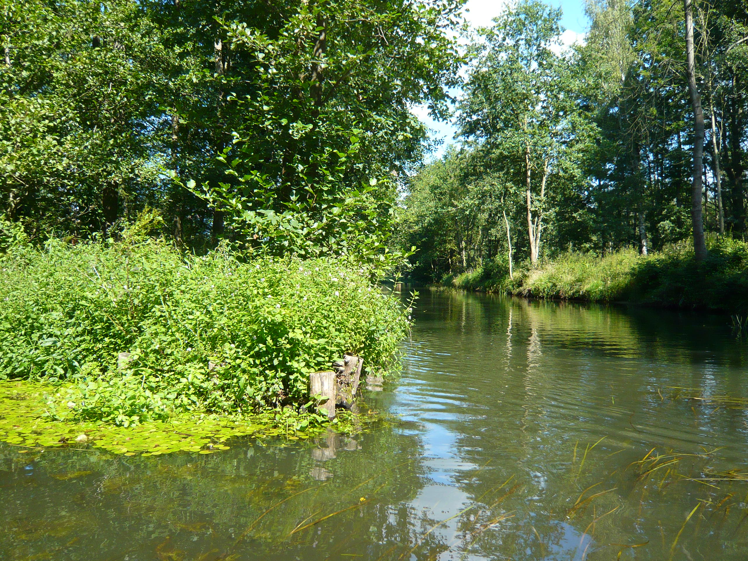 Impression aus dem Schutzwald „Schützenhaus“, Alt Zauche-Wußwerk, Brandenburg